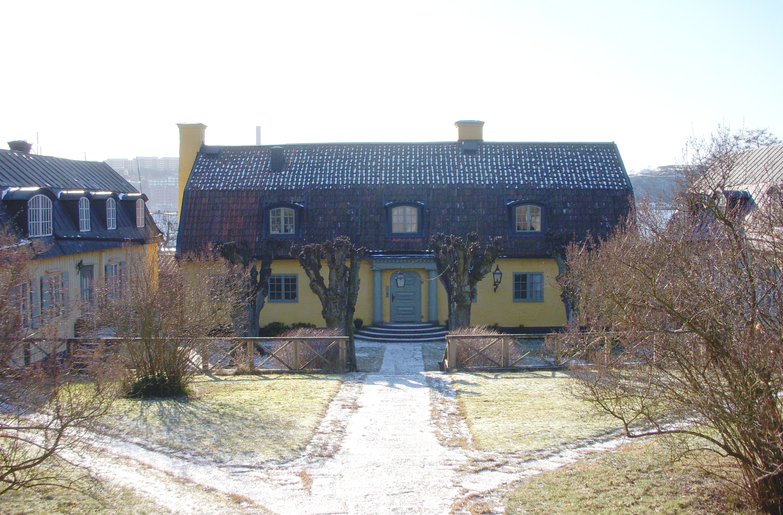 Ferdinand Bobergs gamla "Villa Vintra" på Södra Djurgården, numera kraftig ombyggd